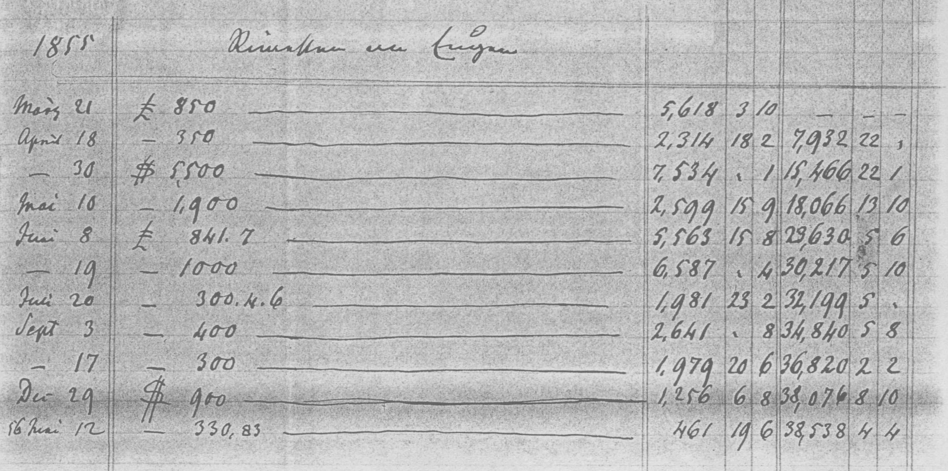 Joseph Gauß: Wechsel (Rimessen) an Eugen Gauß zur Abgeltung des väterlichen Erbteils, ohne Ort, 12. Juni 1856. 3. Spalte von rechts: kumulierter Betrag in Reichstalern Kurant.